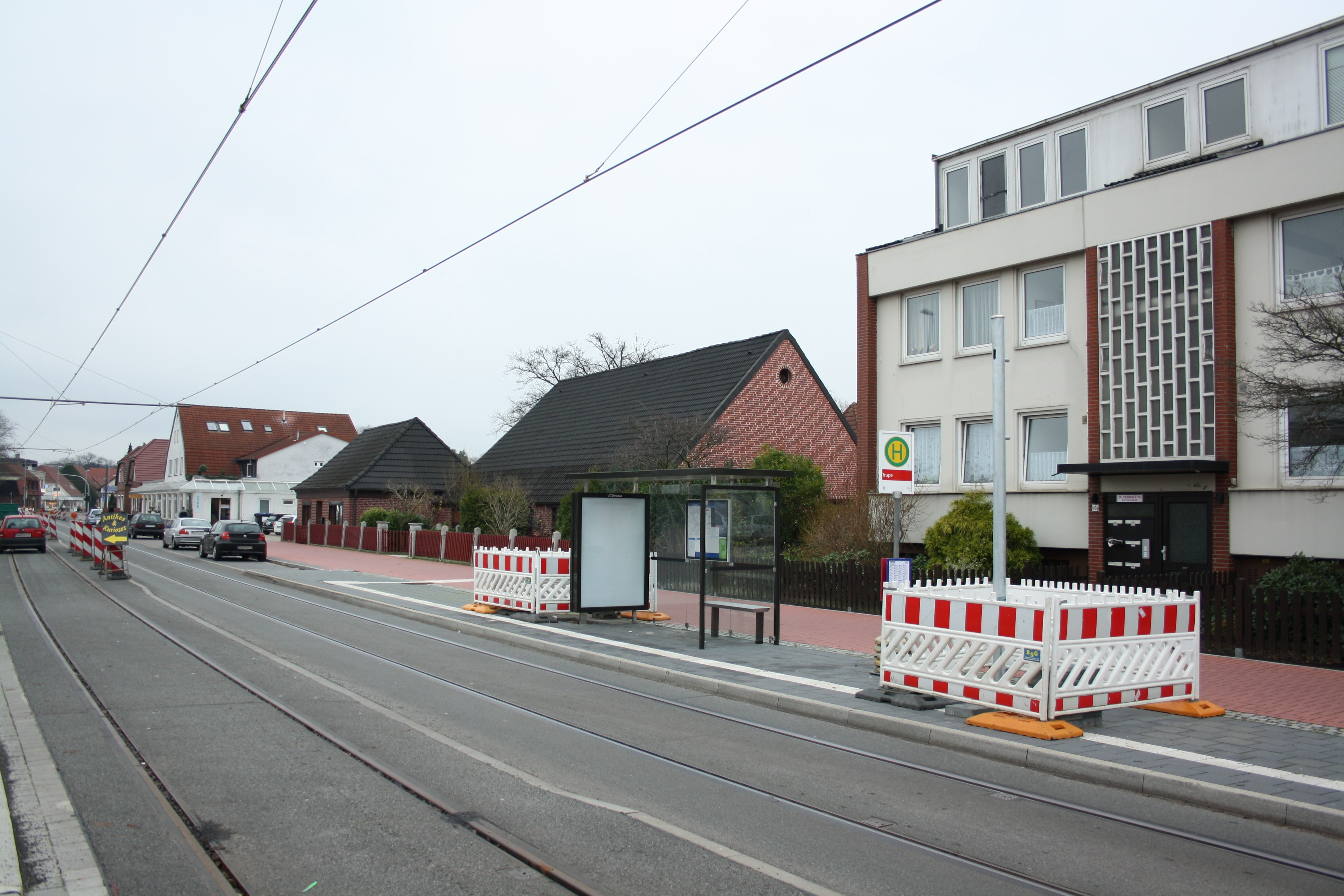 Haltestelle Trupe der im Bau befindlichen Straßenbahn 4 in Lilienthal; Blickrichtung: Nordosten